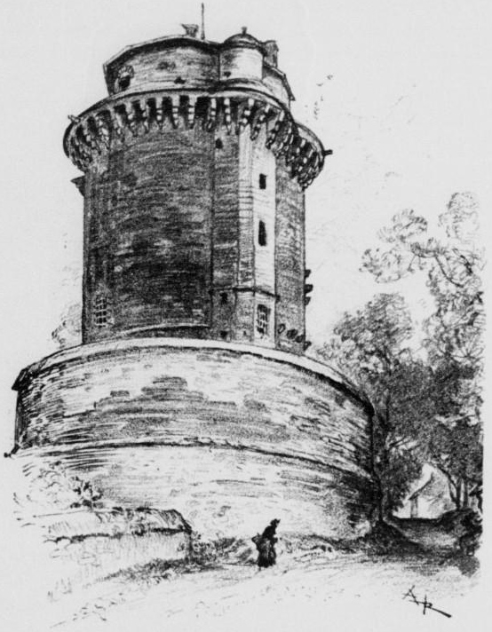 Montfort-sur-Meu : la prison vers 1900 (lithographie d'Albert Robida publiée dans "La vieille France, Bretagne" vers 1900)